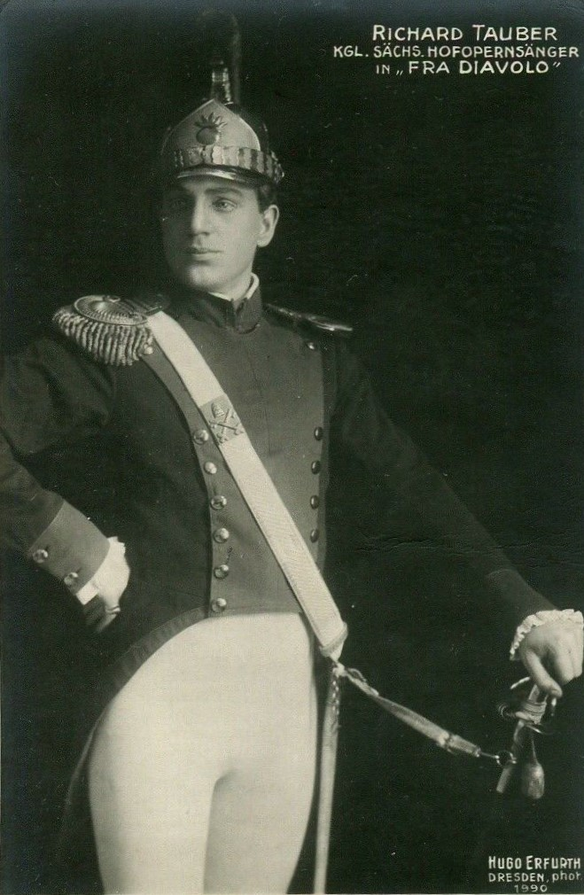 Richard Tauber in Fra Diavolo. Foto von Hugo Erfurth